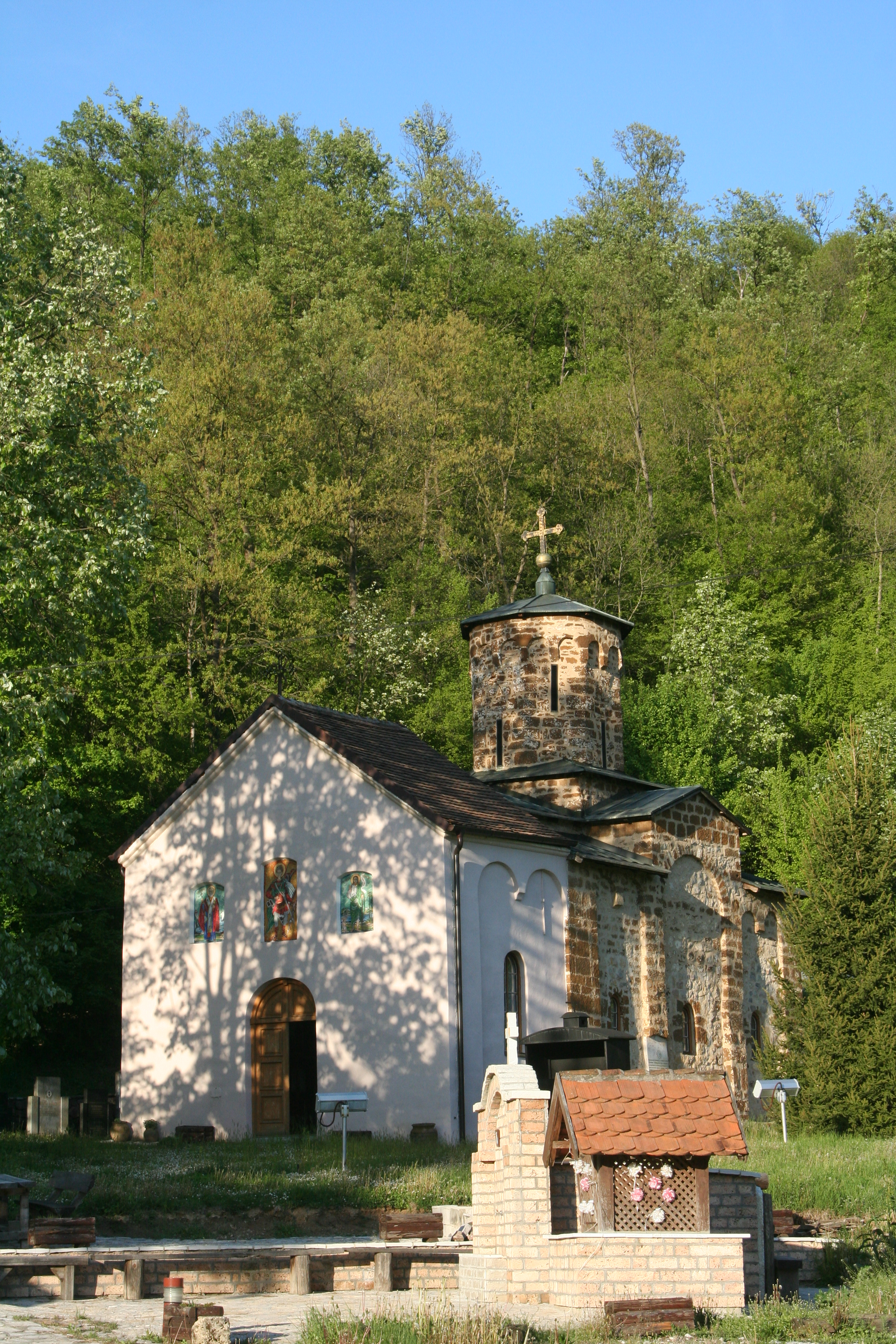 Crkva Sv. Dimitrija, Markova Crkva